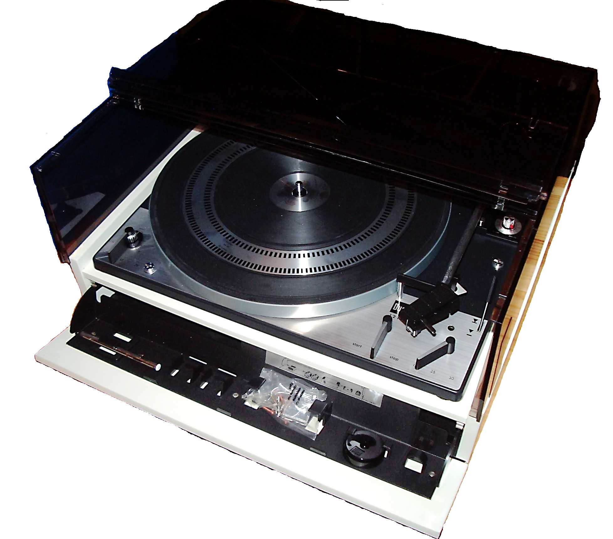 Plattenspieler / Plattenwechsler Dual 1219. Luxuriös ausgestattetes Spitzenmodell der Firma Dual